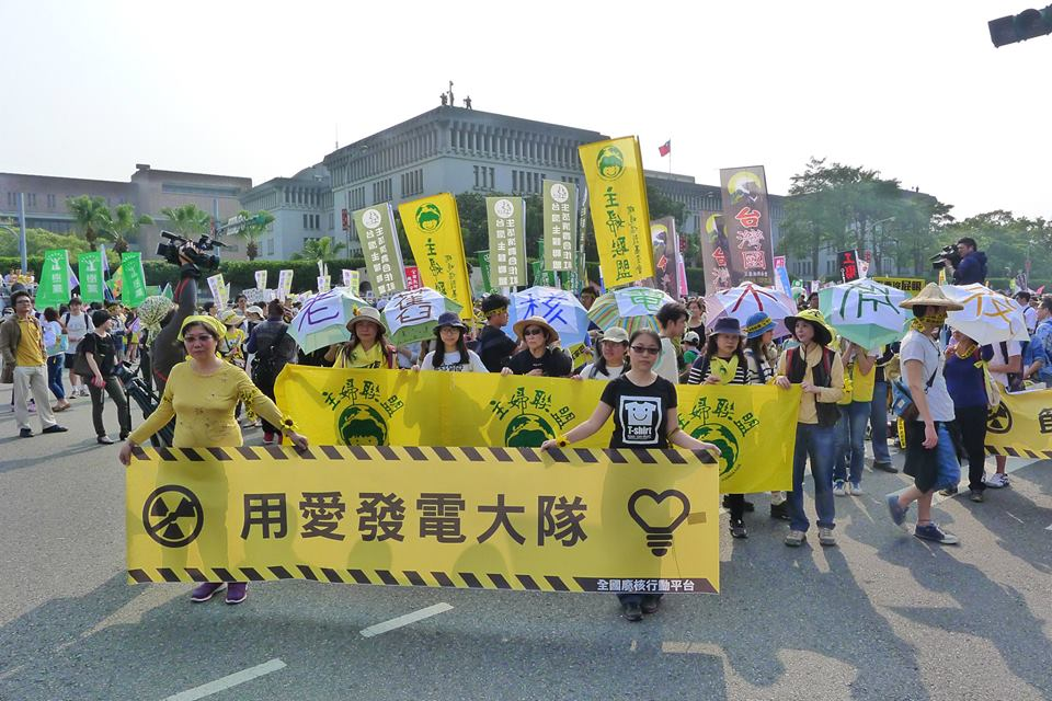 2015年3月14日全國廢核行動平台反核遊行「用愛發電大隊」，參與團體包括樹黨、主婦聯盟、台灣國辦公室。2017年8月15日「815全臺大停電」後，不滿在停電夏夜中摸黑流汗的民眾，紛紛拿主婦聯盟於本次遊行提出的標語「用愛發電」諷刺主婦聯盟，甚至湧入主婦聯盟facebook粉絲頁灌爆負評；同月16日，主婦聯盟執行長呂佳育回應，對於部分民眾不理性的謾罵，或強調「婦女只要關心家務事即可」充滿性別刻板印象的言論，主婦聯盟只能「用愛包容」。